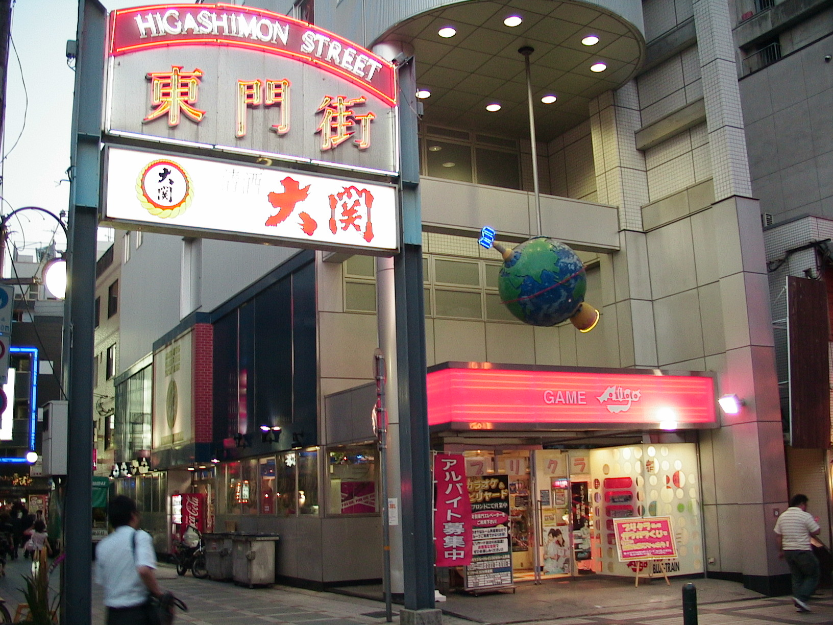 生田東門商店街（いくたひがしもんしょうてんがい）は、兵庫県神戸市中央区の商店街。 商店街の両端に「東門街」と書かれたアーチがあることから、「東門街」の名で知られている。「生田東門商店街協同組合」という商店主組織がある。 生田神社の東側をなぞるように南北に走る道路東門筋に面し（東門筋の名は、ほぼ中間地点に生田神社の東門があることに由来している）、いわゆる「雑居ビル」が多く建ち並び、夜間営業を中心とした飲食店などが多い。このため、19時から翌朝4時までの時間帯と、それ以外の時間とでは、混雑ぶりに大きな差があり、「夜の歓楽街」として知られる場所である。 しかし、一般的に「夜の歓楽街」でイメージされる風俗営業店は、（周辺にはあるが、）このエリアにはない。また、昼間時にも、コンビニエンスストア・文具店・酒屋・一般ホテル・薬局などが営業しているため、昼夜とも商店街として機能しつつ、昼と夜で雰囲気が変わるという特徴を持つ。 現在「三宮」と呼ばれるエリアの大部分は、1930年代以降、特に戦後に商業地となったが、生田東門商店街のルーツは明治時代にさかのぼる。また、明治初期には、東門筋東側の、旧生田川（現在のフラワーロード）までのエリアに、神戸外国人居留地競馬場があった。 1995年の阪神・淡路大震災では、多くの建物が倒壊した。由緒ある商店街でありながら、建物の多くが比較的新しいのはこのためである。 北東部には「三角マーケット」と呼ばれるエリアがある。かつては「三角マーケット協同組合」があったが、震災で建物が倒壊し多くの店舗が転出したことで維持が困難となり、2006年に解散した。